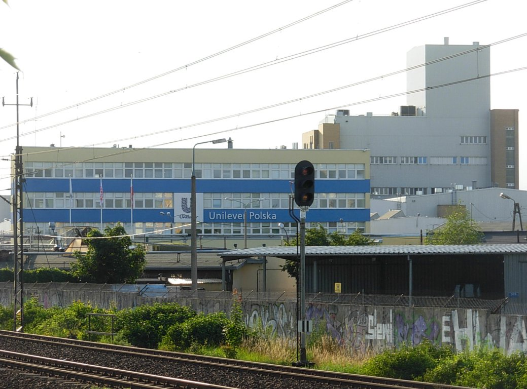 Zakłady Unilever w Bydgoszczy